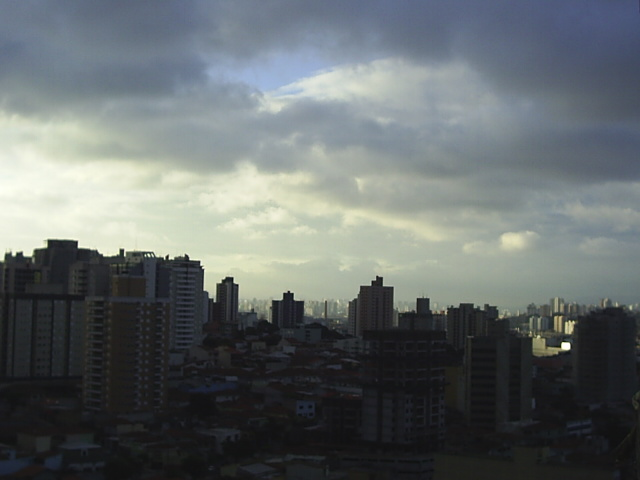 São Caetano do Sul com o centro de São Paulo iluminado pelo sol, no horizonte.